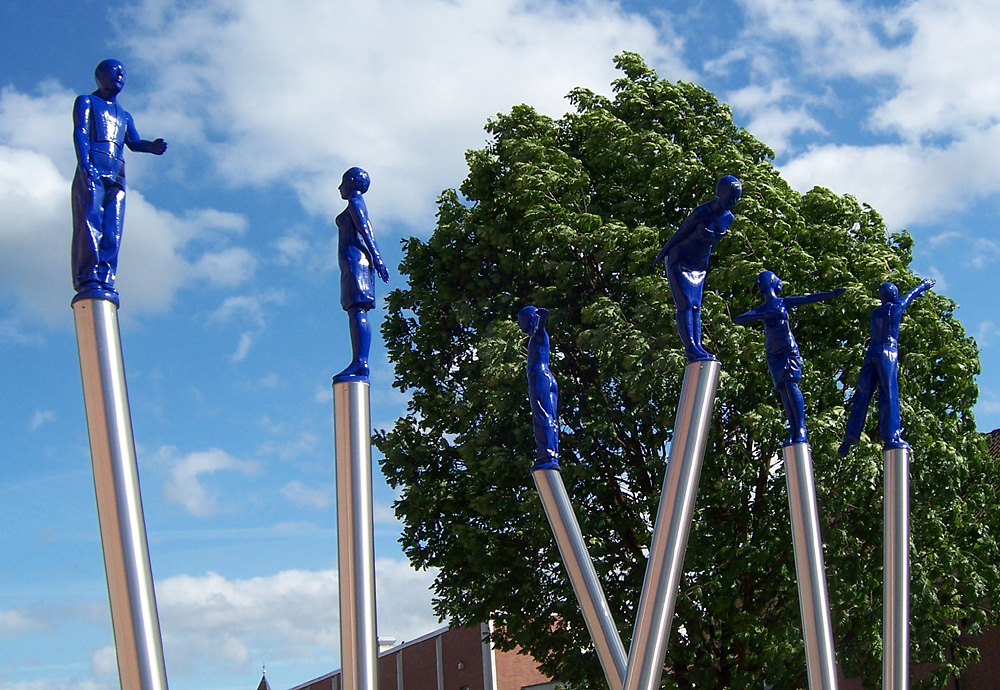 Gisela Eufe: „Szenario“ 2007. Sechs Figuren auf Edelstahlrohren, Polyester, Farbe; je ca. 5,7 m hoch. Beschreibung: „Sechs Figuren sind in ihren Bewegungen angehalten wie aus einem stummen Theater. Sie führen uns in ein Spiel von Komik und Tragik, deren Regisseur wir Betrachter sind“. Kunst im öffentlichen Raum - ein Bremer Programm. k: kunst im öffentlichen raum bremen